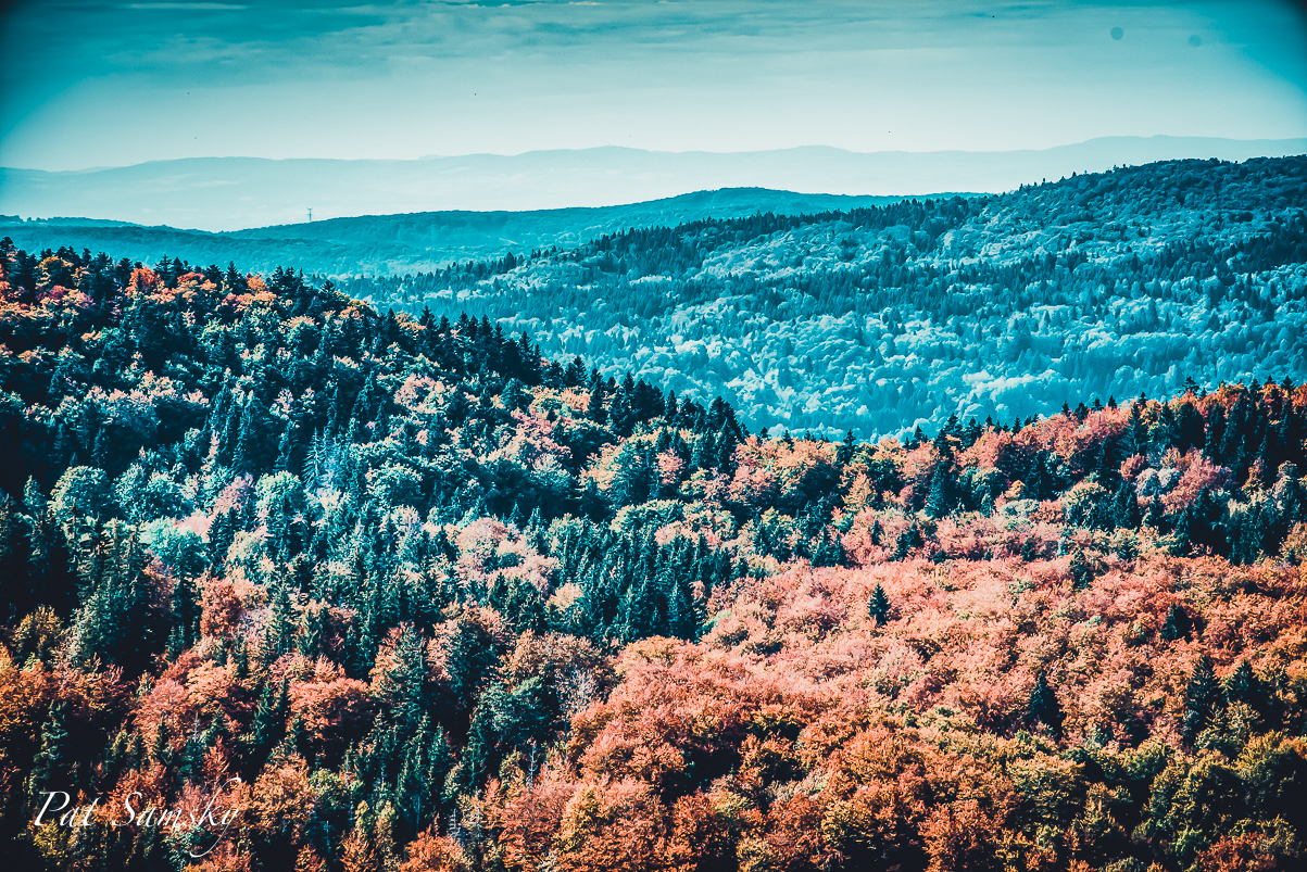 Forêt Les Bouchoux